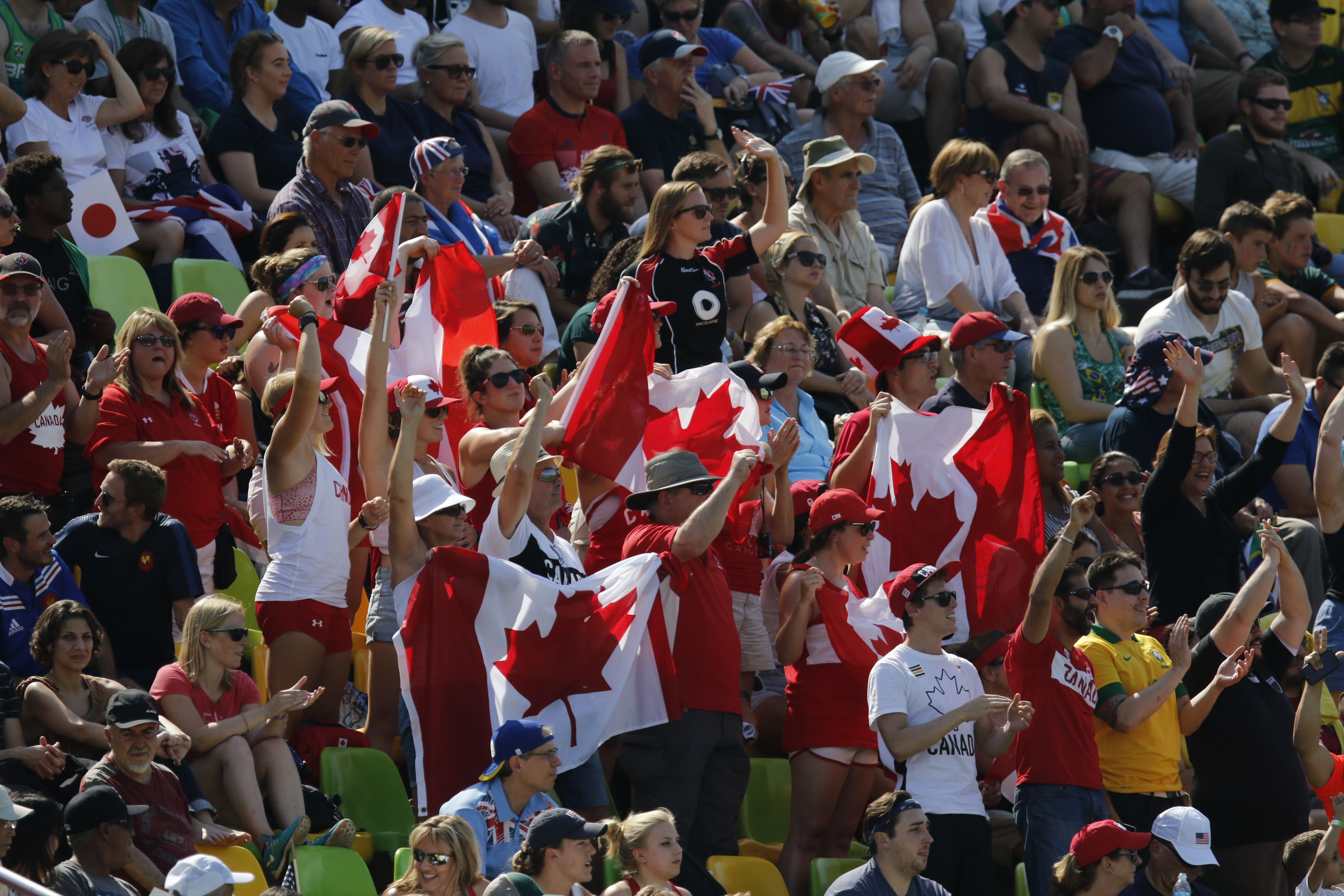 Rugby feminino: Canadá vence Japão por 45 a 0